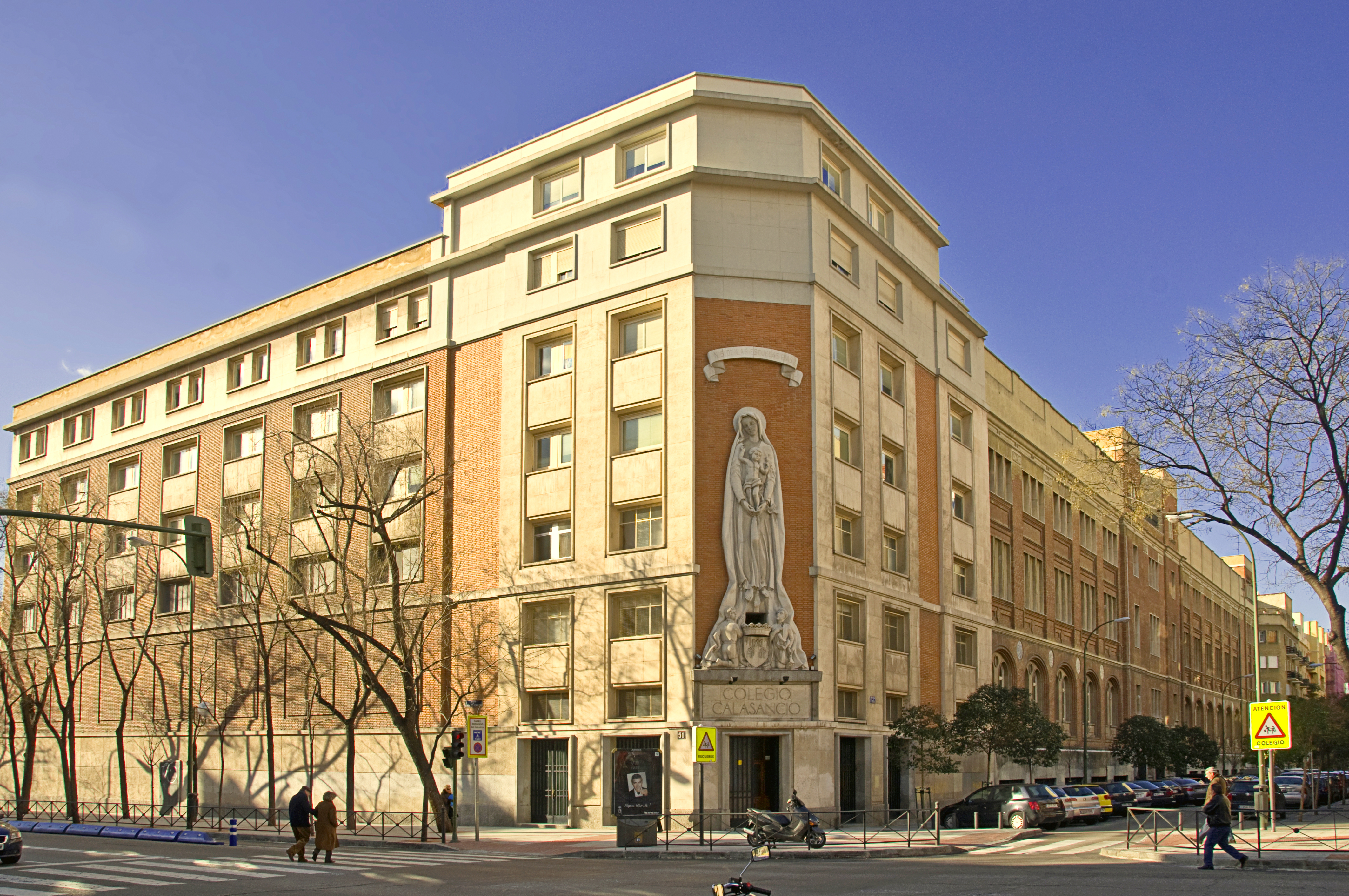 Colegio Calasancio de las Escuelas Pias - calle Padilla esquina Conde de Peñalver - Madrid - España - Enero 2010.